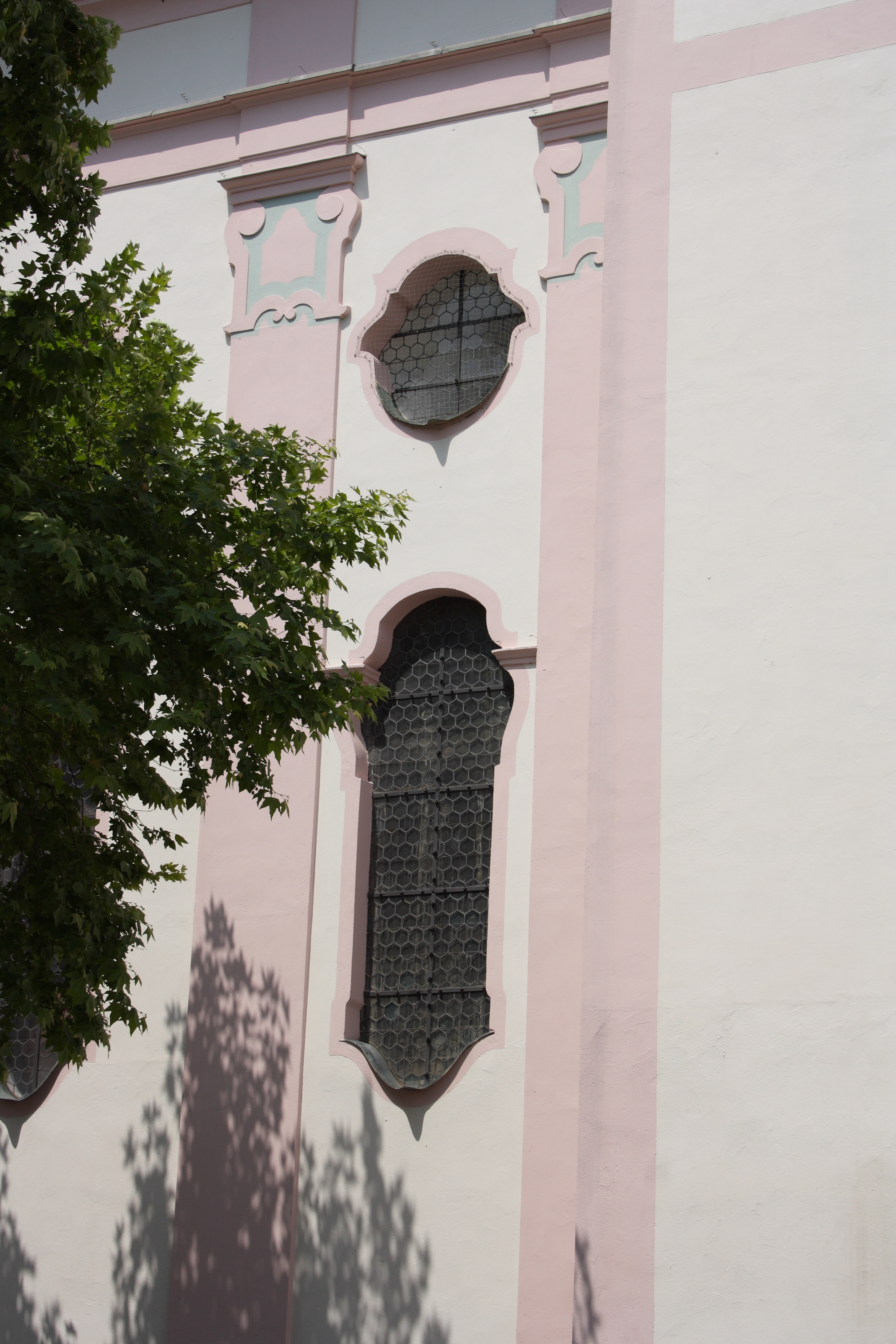 Katholische Kirche Zu Unserer Lieben Frau (Frauenkirche) in Günzburg (Bayern), 1736-1741 von Dominikus Zimmermann gebaut, Fenster und Pilaster an der Südfassade